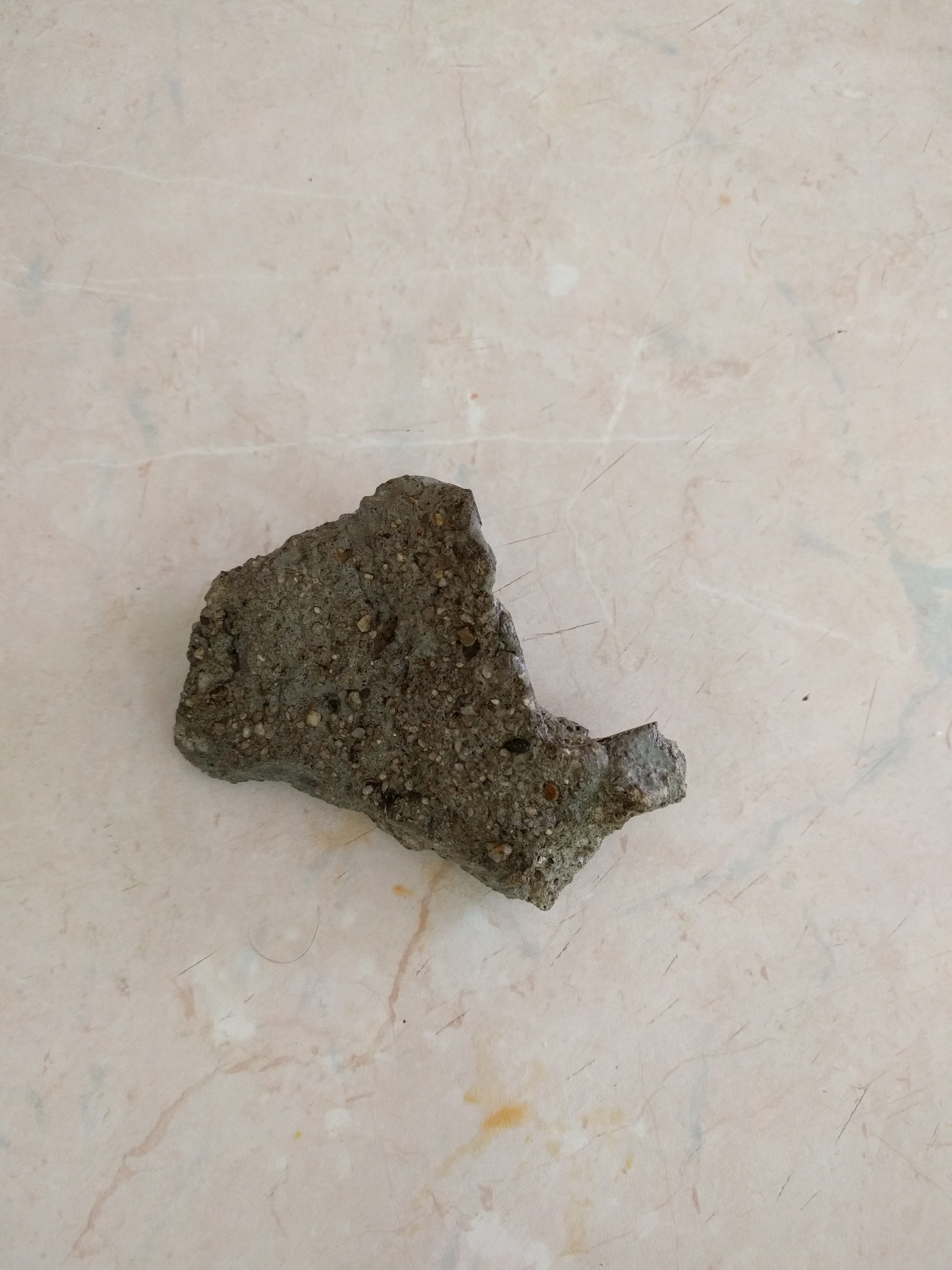 Камък от Римски терми - Варна от задната му страна